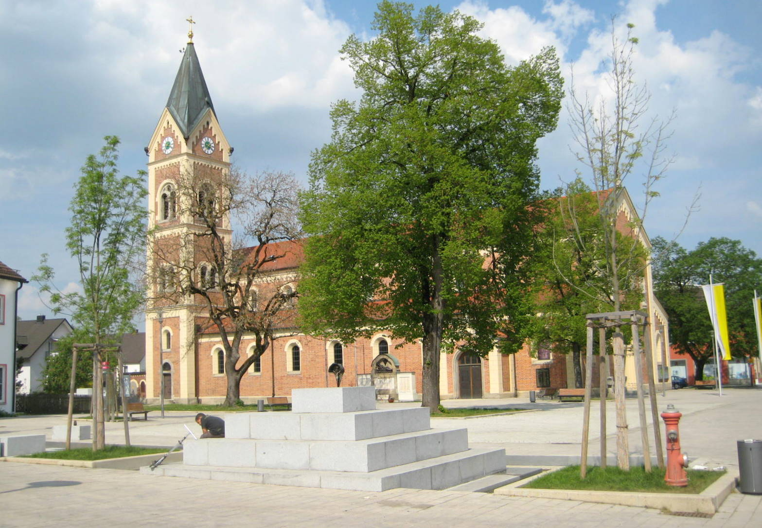 Das Bild wurde vor dem neuen Brunnen aufgenommen, wo einmal die alte Olchinger Kirche stand.